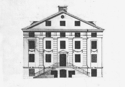 Lillienhoffska palatset. Ansökan om förändring av taklag (utfört)